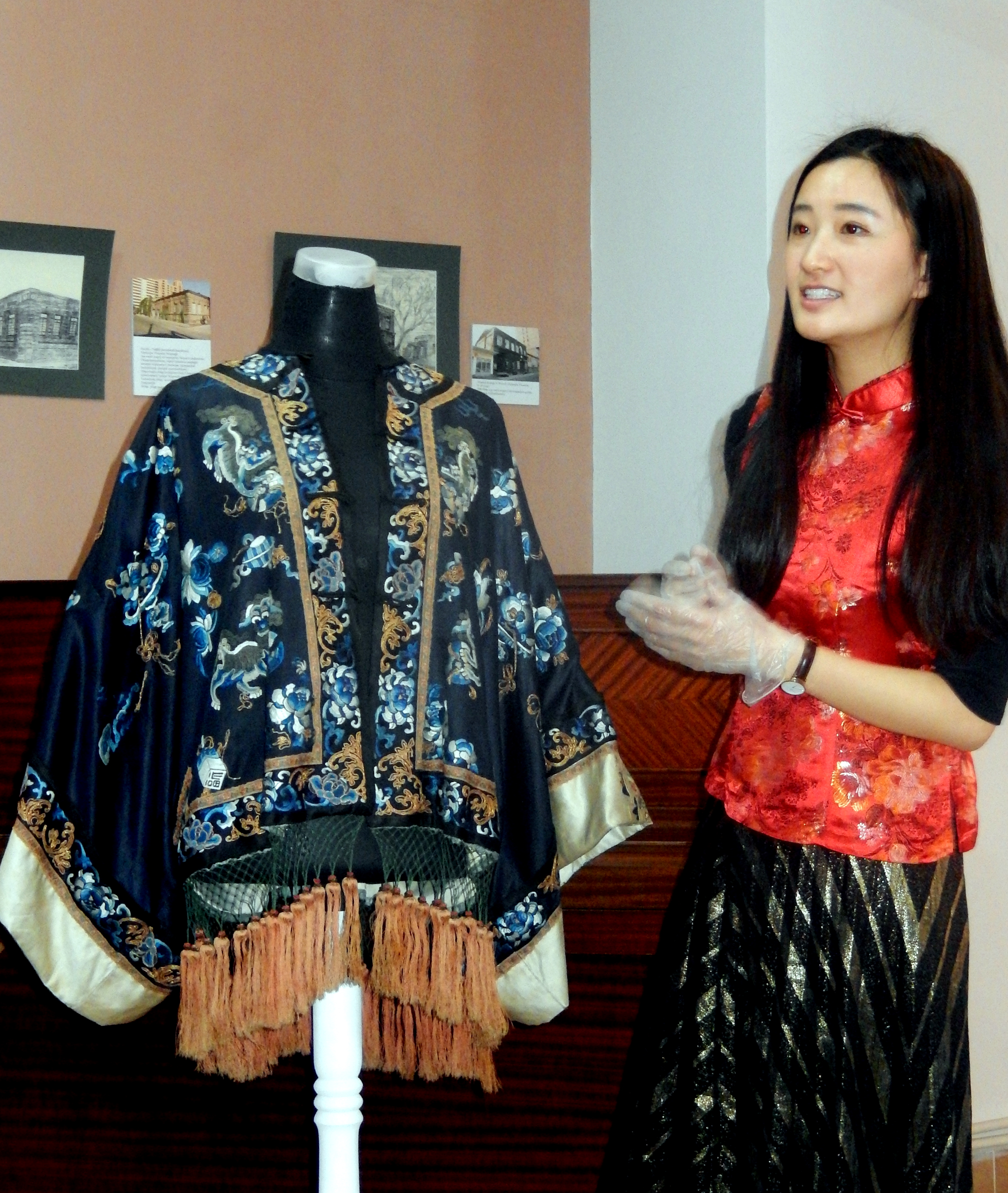 Yiqun Sun presents Varvara Spendiarova's kimono at Alexandr Spendiaryan house-museum during the project "History of one exhibition item"